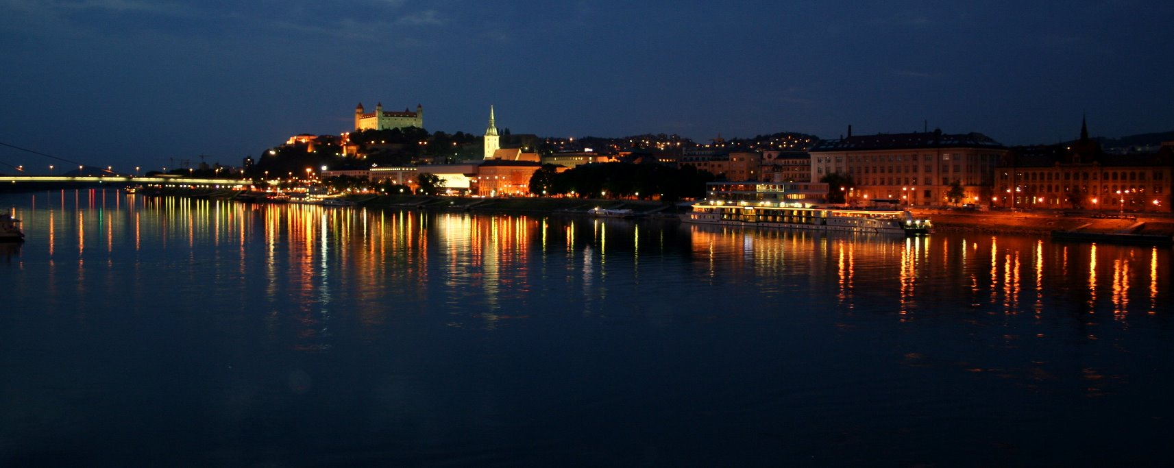 Bratislava, as seen from Petrzalka && old bridge.